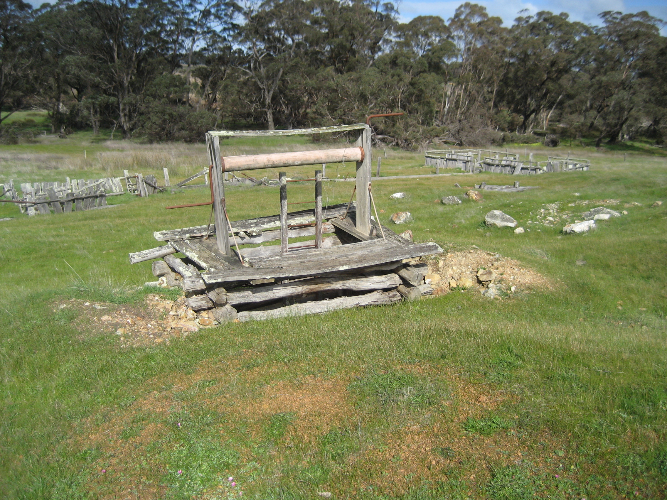 Gold mine, Kendenup, Western Australia